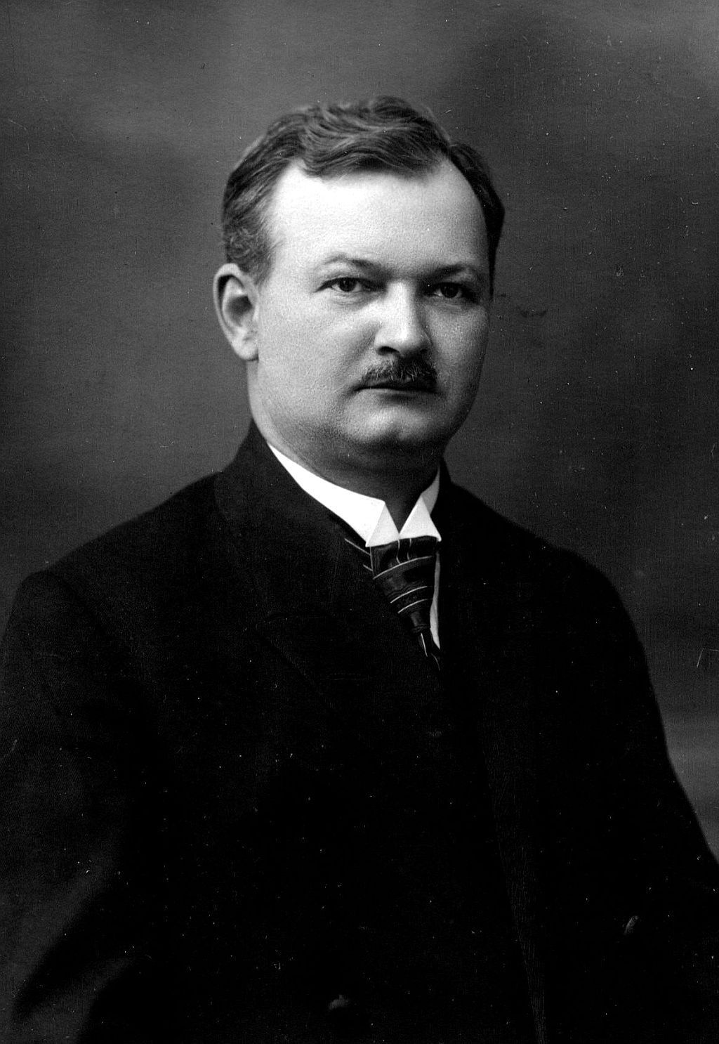 Harry Palme (1882-1955), český sklářský průmyslník